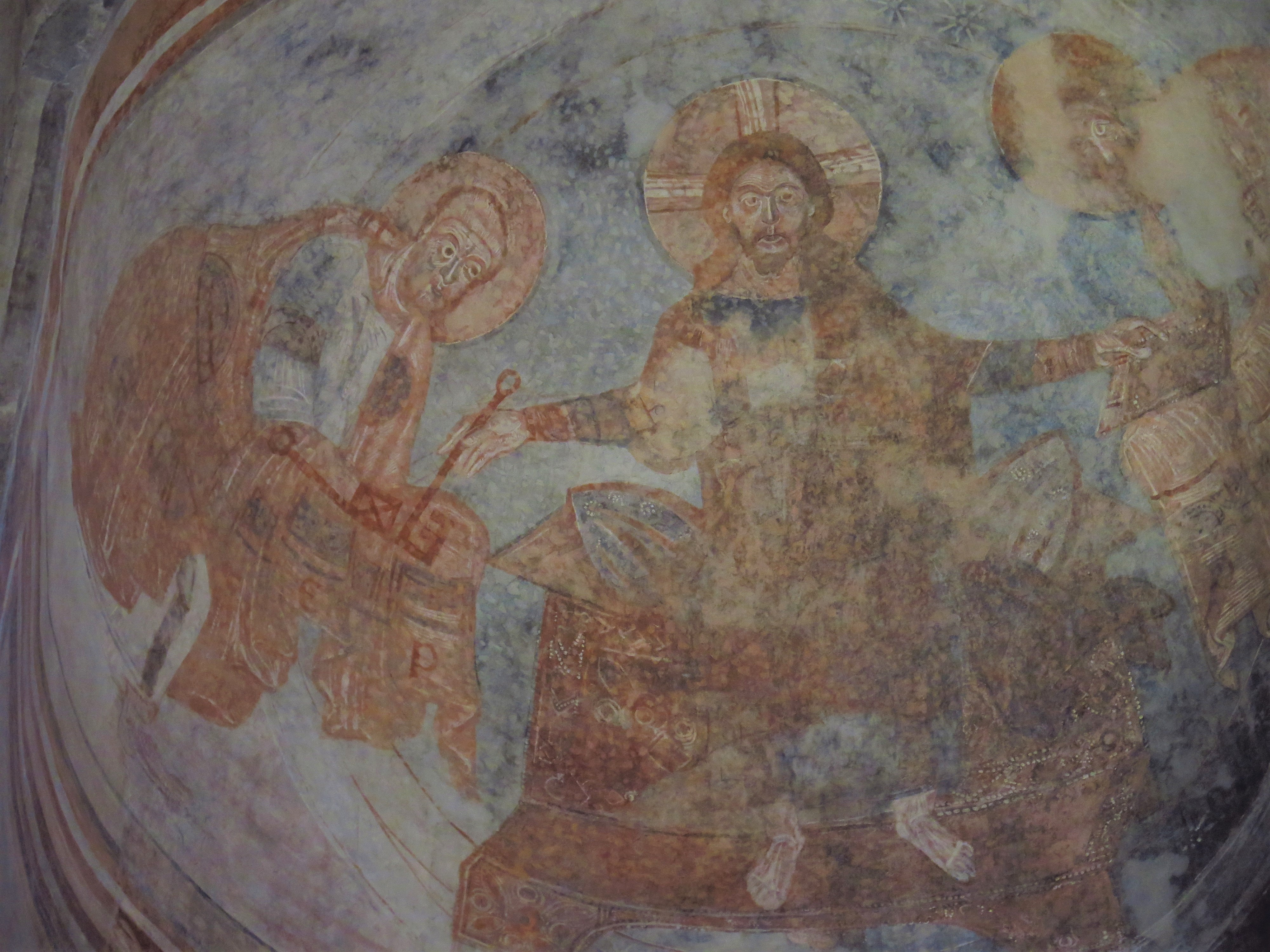 Benediktinerinnenkloster St. Johann, Müstair: Christus zwischen den Aposteln Petrus und Paulus (Karolingisches Fresko in der linken Seitenapsis der Klosterkirche, um 800)